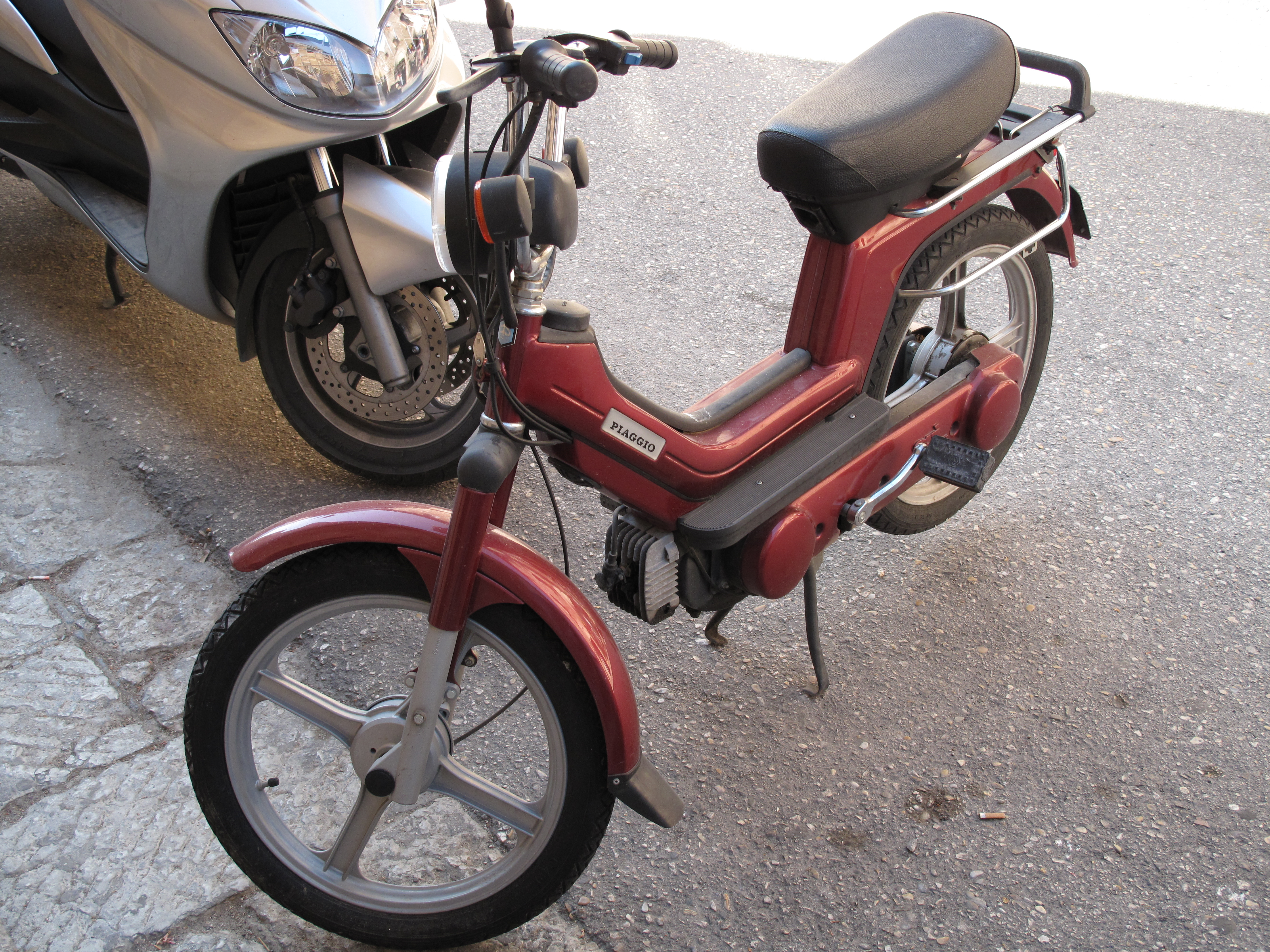 Si piaggio